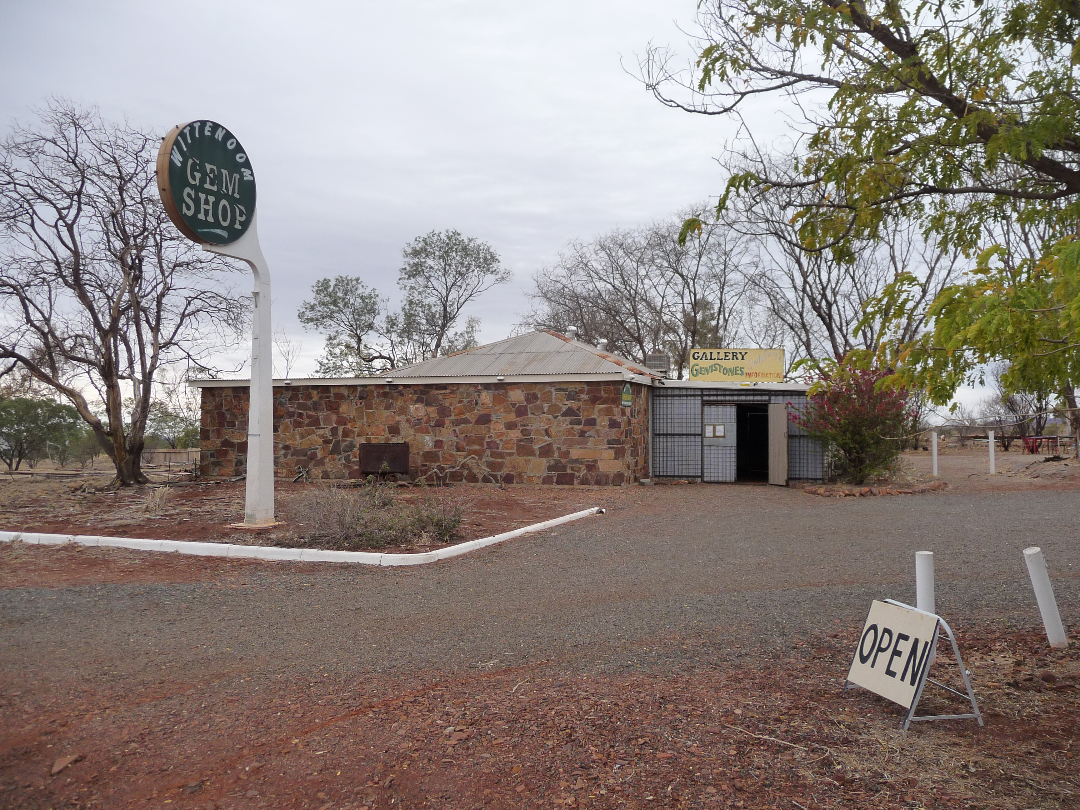 Wittenoom Gem Shop